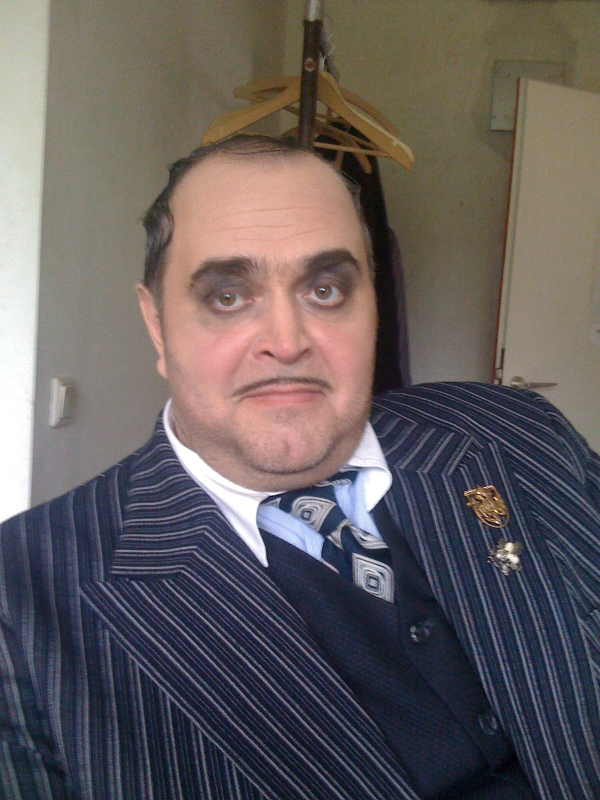 Juri Batukov im Kostüm des Swallow (Peter Grimes), Garderobe bei den Wuppertaler Bühnen